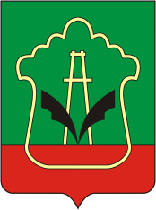 Герб языком символов и аллегорий отражает природные, экономические и исторические особенности Альметьевского района.